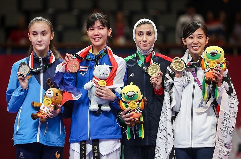 ناهید کیانی در مسابقات تکواندو بازی‌های آسیایی ۲۰۱۸